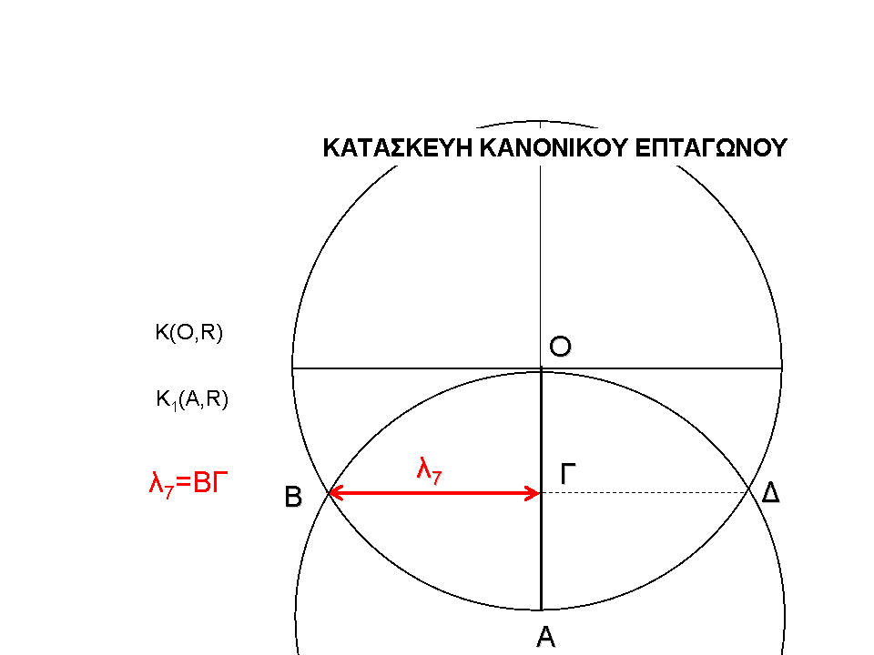 ΚΑΤΑΣΚΕΥΗ ΚΑΝΟΝΙΚΟΥ ΕΠΤΑΓΩΝΟΥ